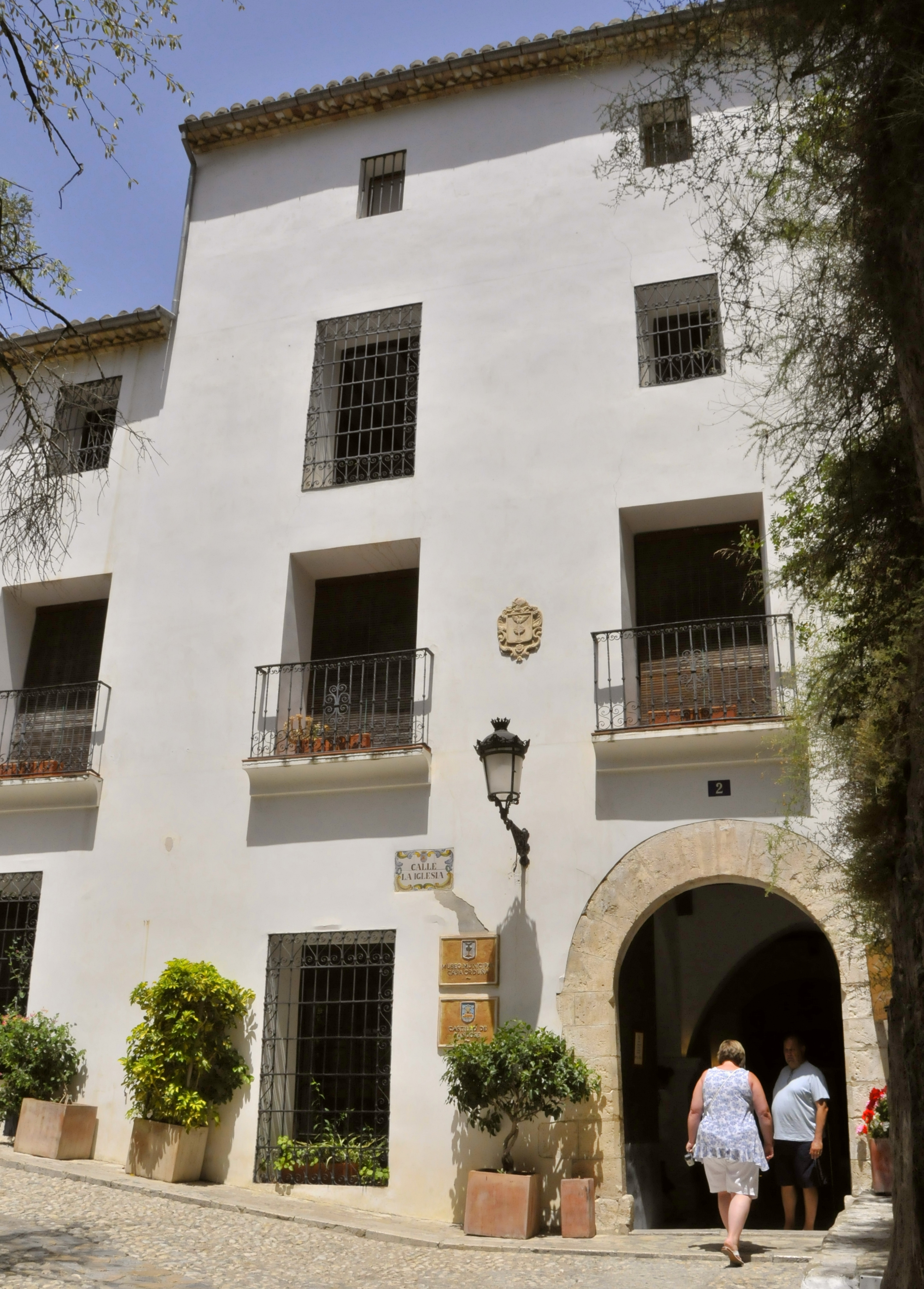 Guadalest, Stadthaus